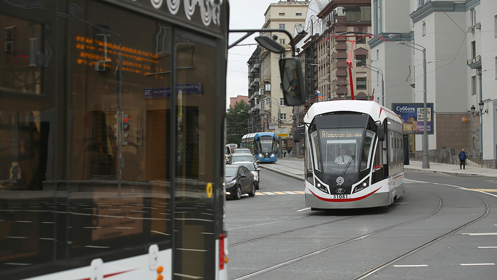 Трамваи модели 71-931М («Витязь-М») пересекают 1-ю Тверскую-Ямскую улицу в Москве